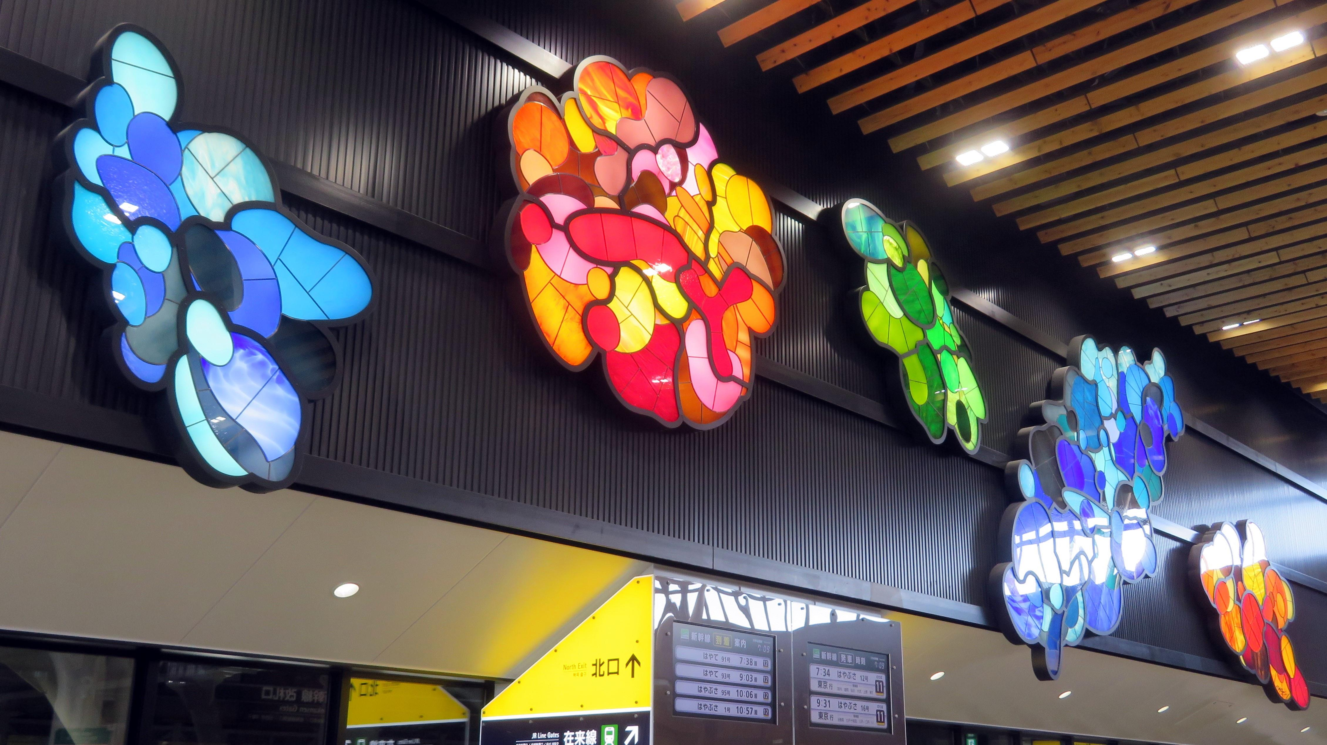 新函館北斗駅壁面(自由通路)